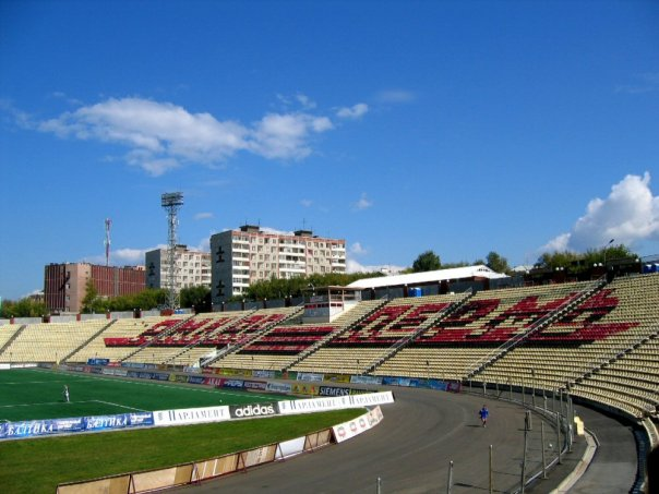 Stadion týmu Zvezda v Permu, Rusko